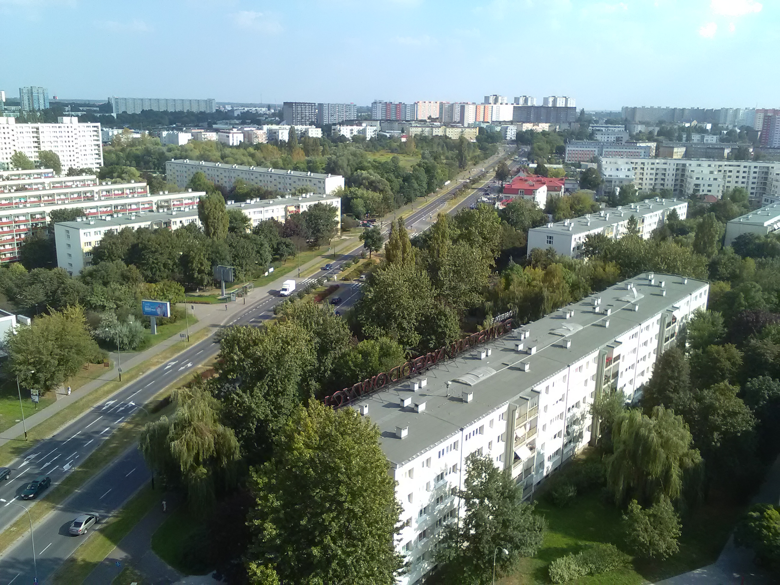 Widok na osiedla Oświecenia i Powstań Narodowych oraz ulicę Piłsudskiego w Poznaniu.